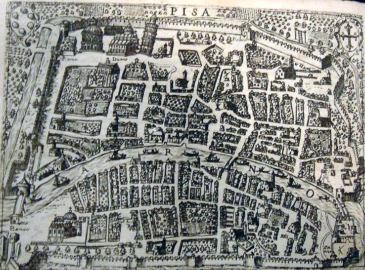 Историческая карта Пизы